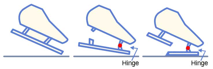 Duo Schaats